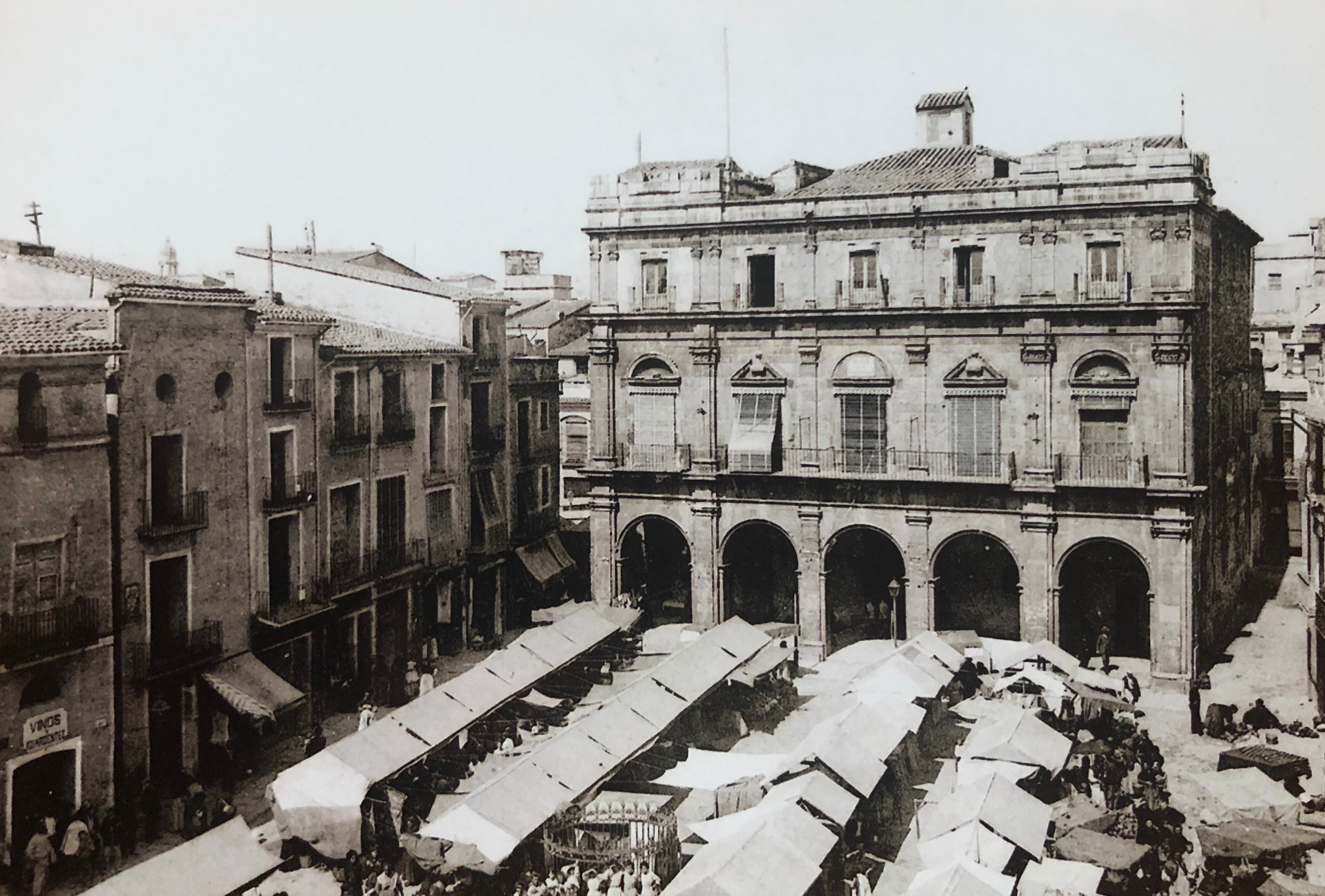 casetes mercat plaça Vella foto de José Prades cedida per Sucine